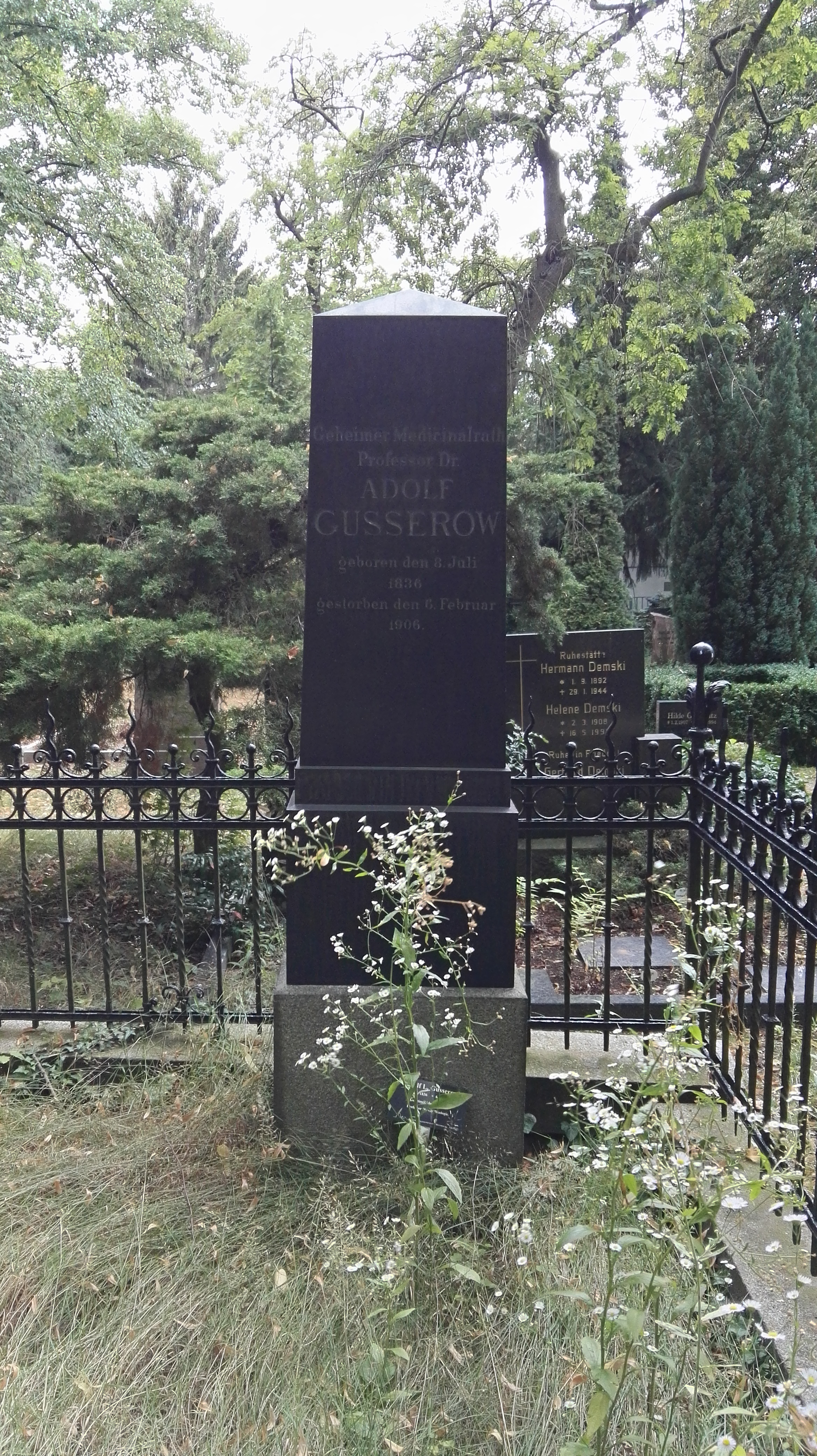 Grab von Adolf Gusserow auf dem Friedhof I der Dreifaltigkeitsgemeinde (Friedhöfe vor dem Halleschen Tor)